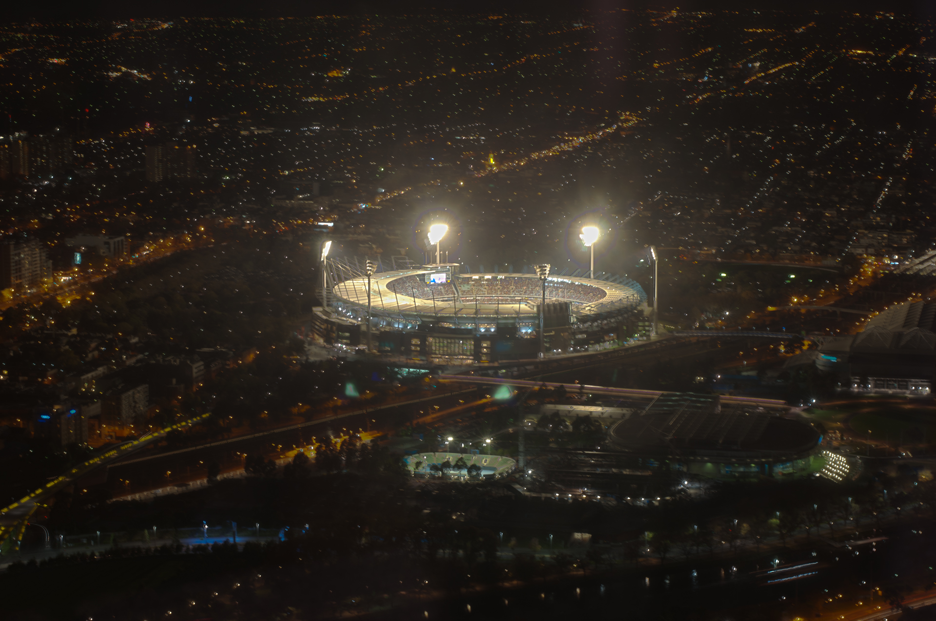 From Eureka Tower